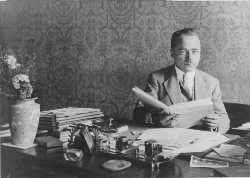 Bildnis in seinem Arbeitszimmer in der niederösterreichischen Landwirtschaftskammer.